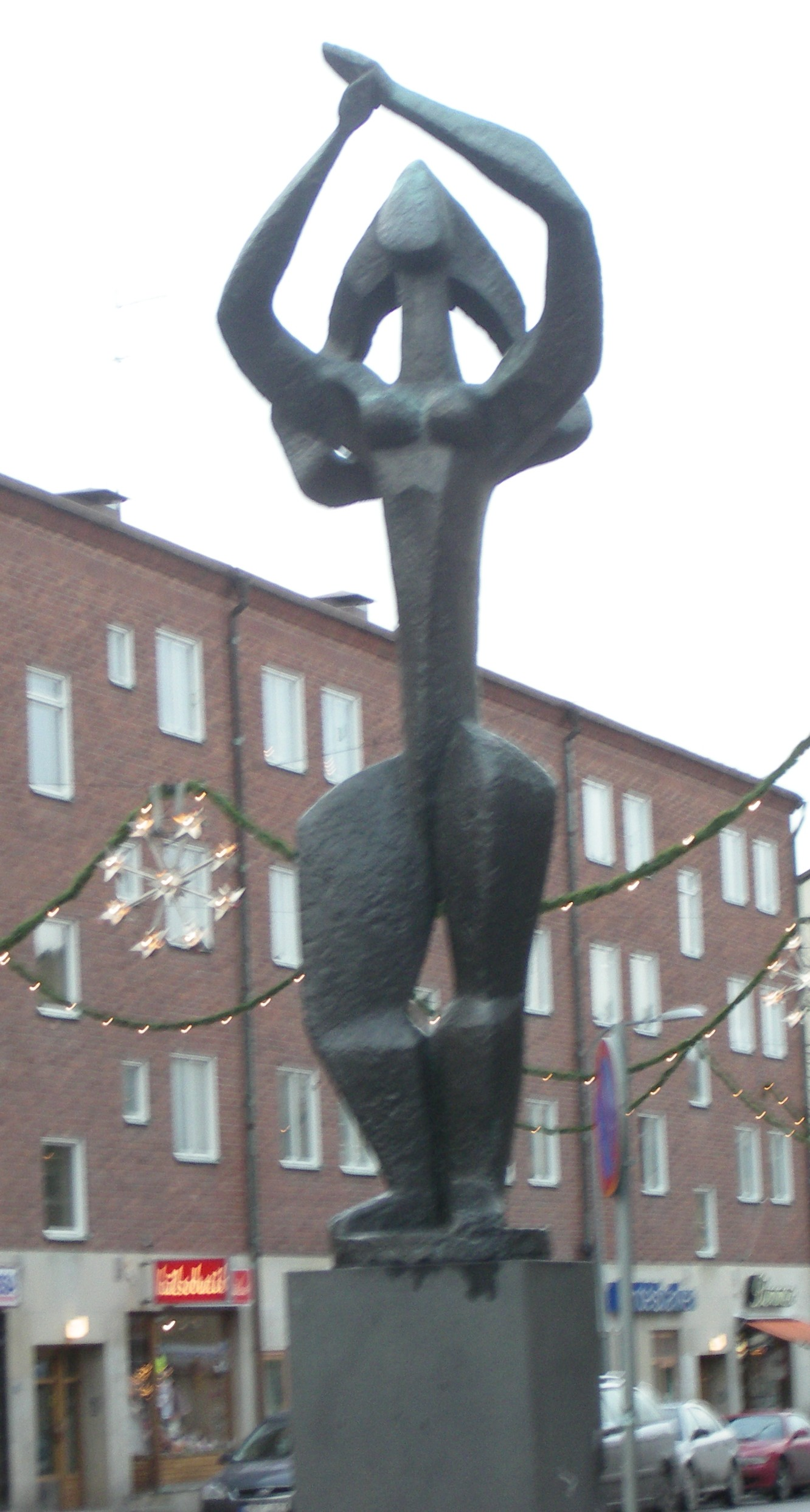 Eric Grates Trädet, i folkmun Hembiträdet, Torget i Västertorps centrum, Stockholm.